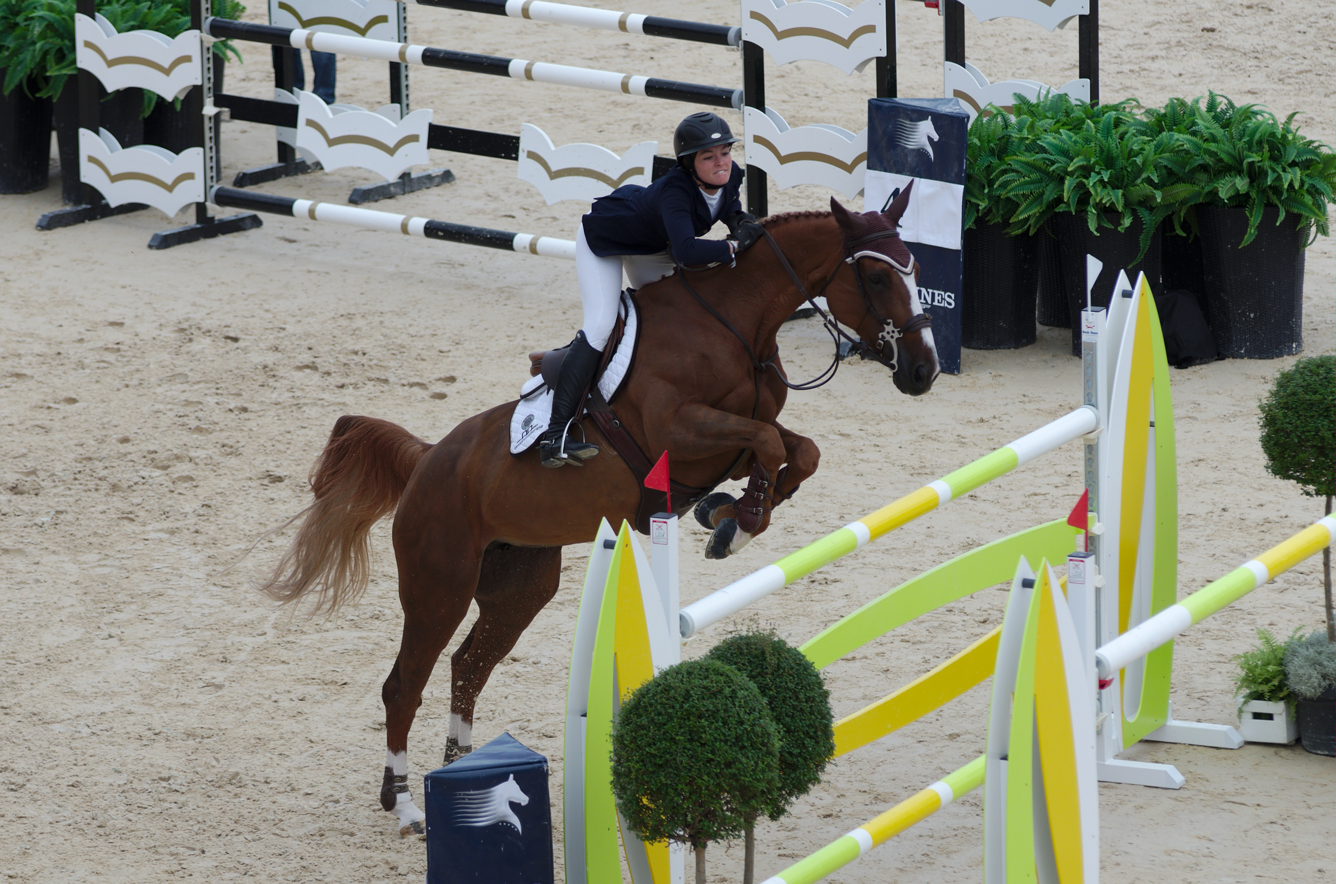 2013 Longines Global Champions - Lausanne - 14-09-2013 - Reed Kessler et Soraya de l'Obstination